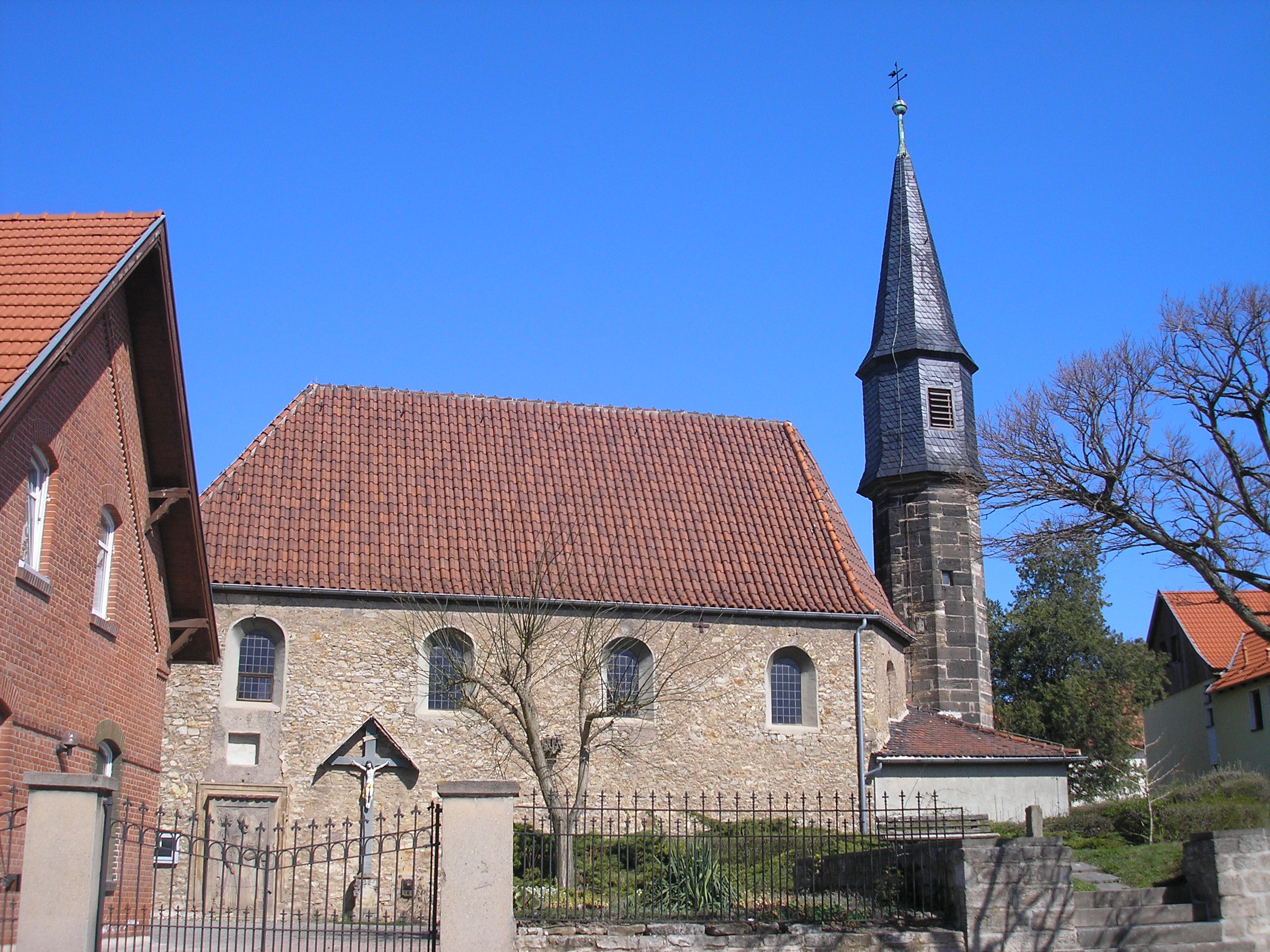 Die Martinikirche in Dittelstedt (Erfurt).